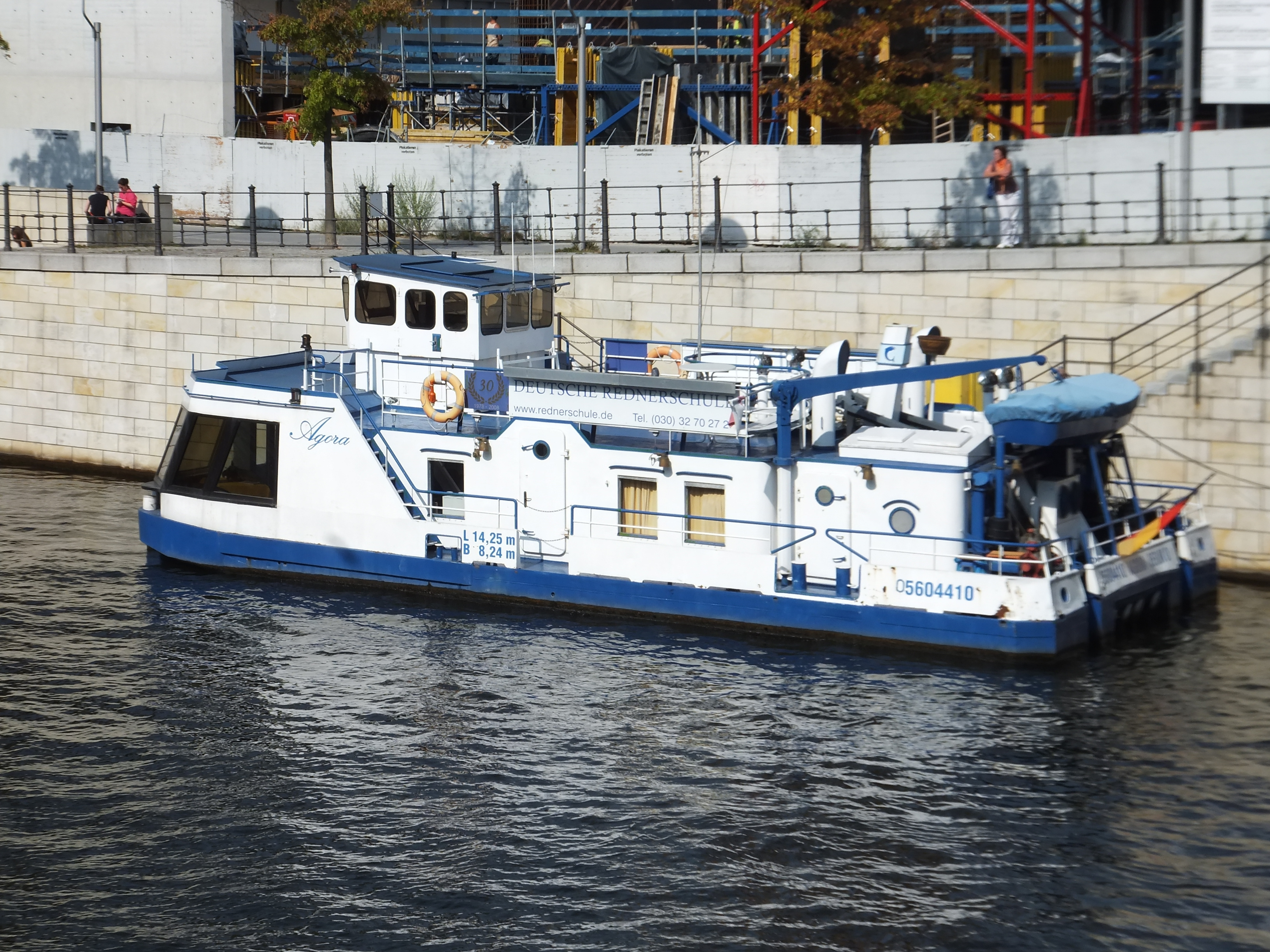 Fahrgastschiffe in Berlin: Agora / Rednerschule